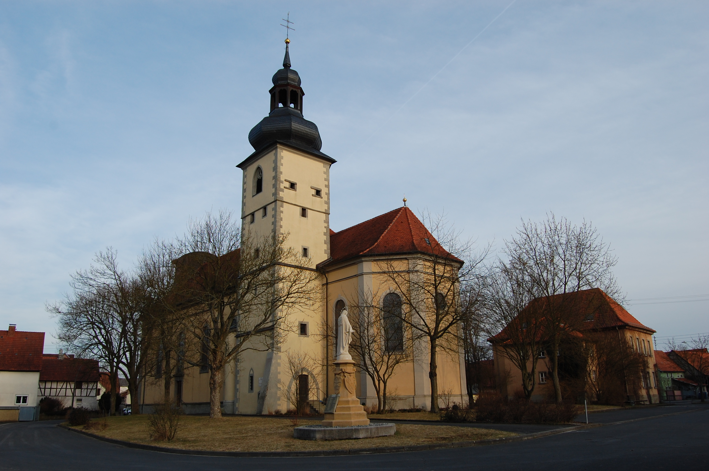 Großwenkheim, Stadt Münnerstadt, Kreis Bad Kissingen, Kirche Mariä Himmelfahrt (2011)